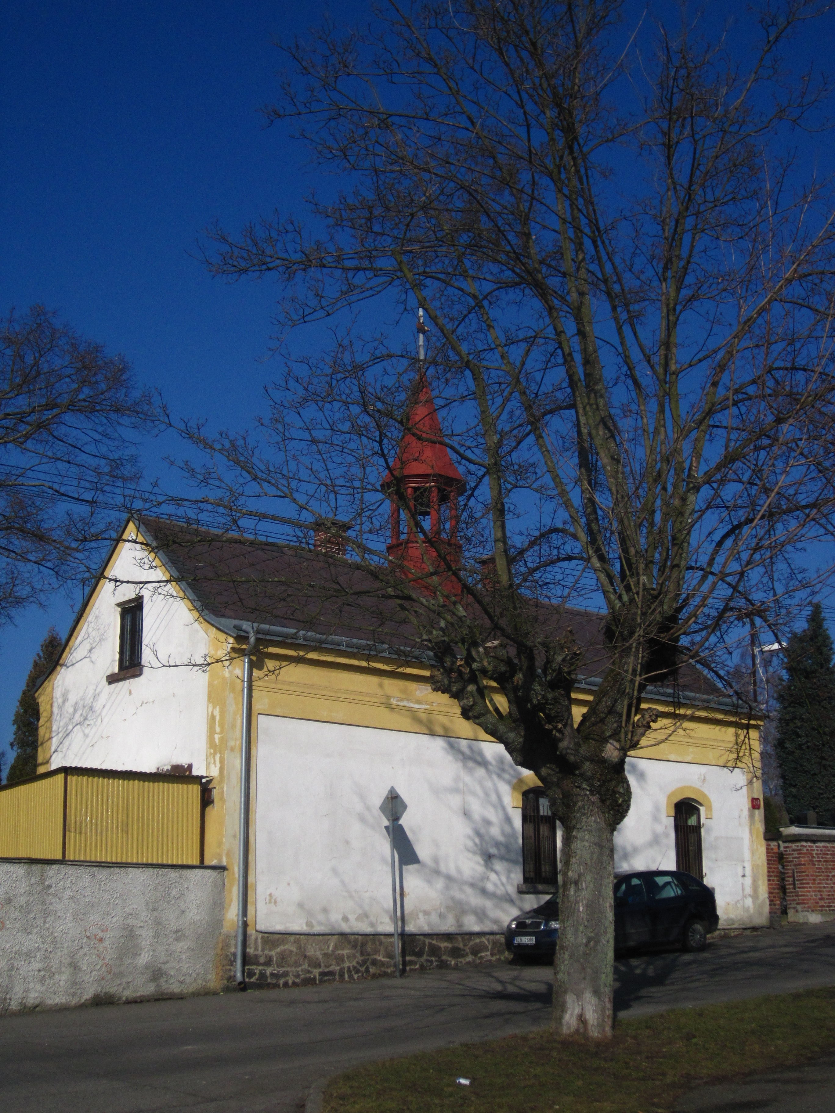 Liberec-Ruprechtice - hřbitov - márnice